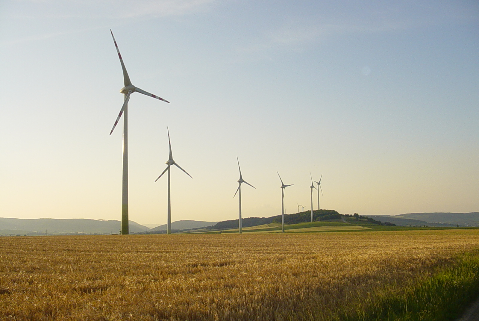 Blick auf den Windpark "Hoher Kölbling" der EVN-Naturkraft Richtung Norden, 6 (+2) Enercon E70-2MW, nördlich von St.Pölten